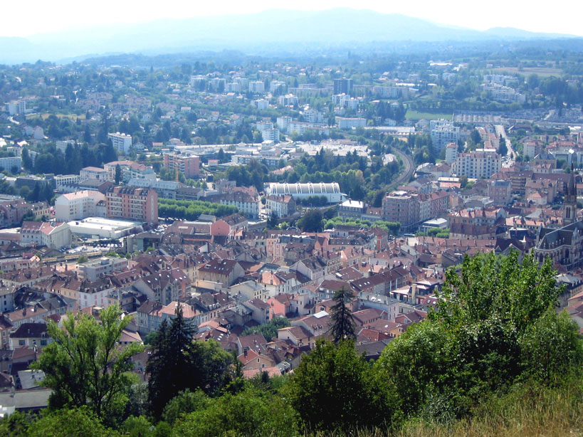 vue de Voiron (Isère) depuis le Bois joli.